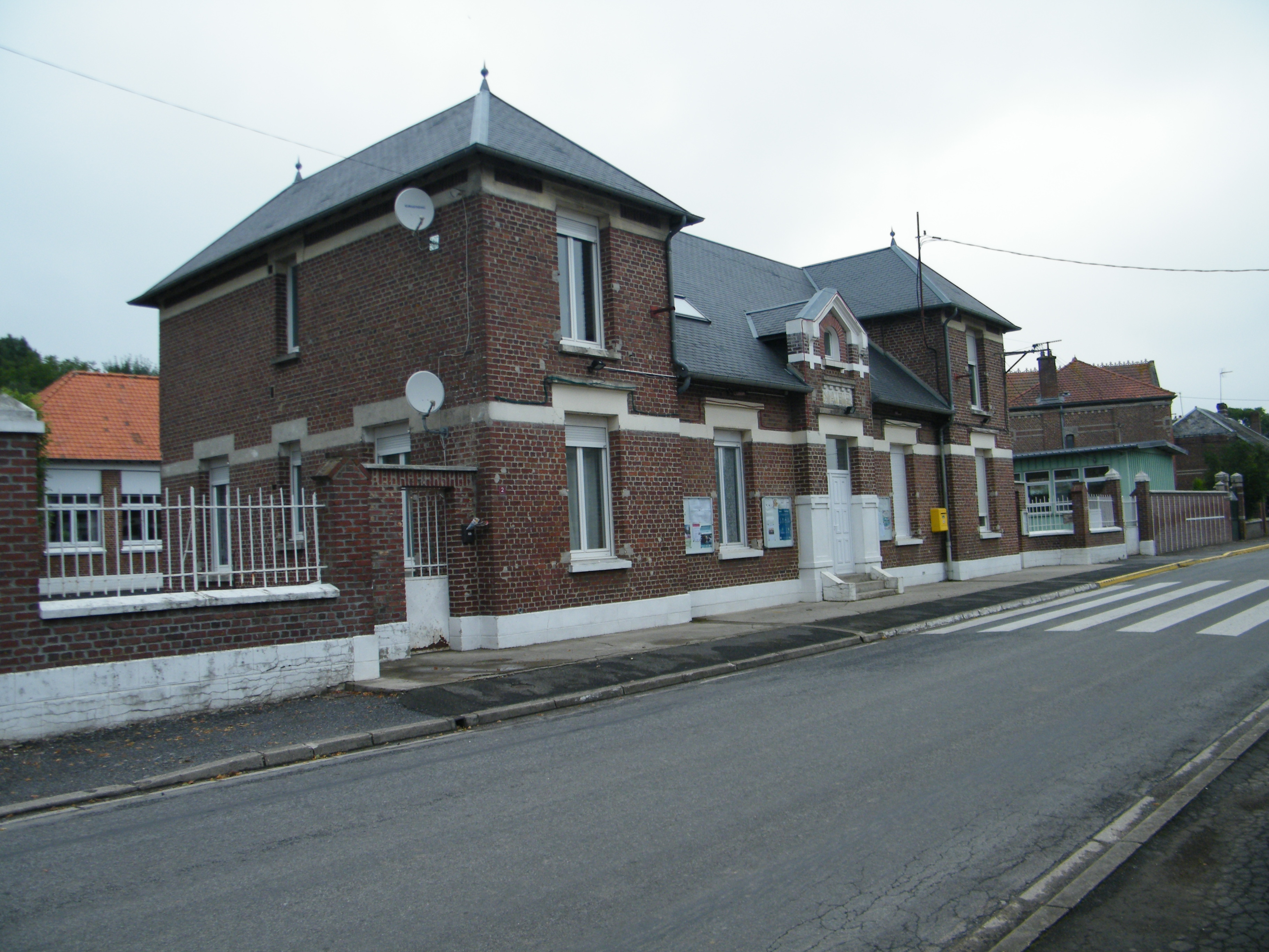 Mairie-école.